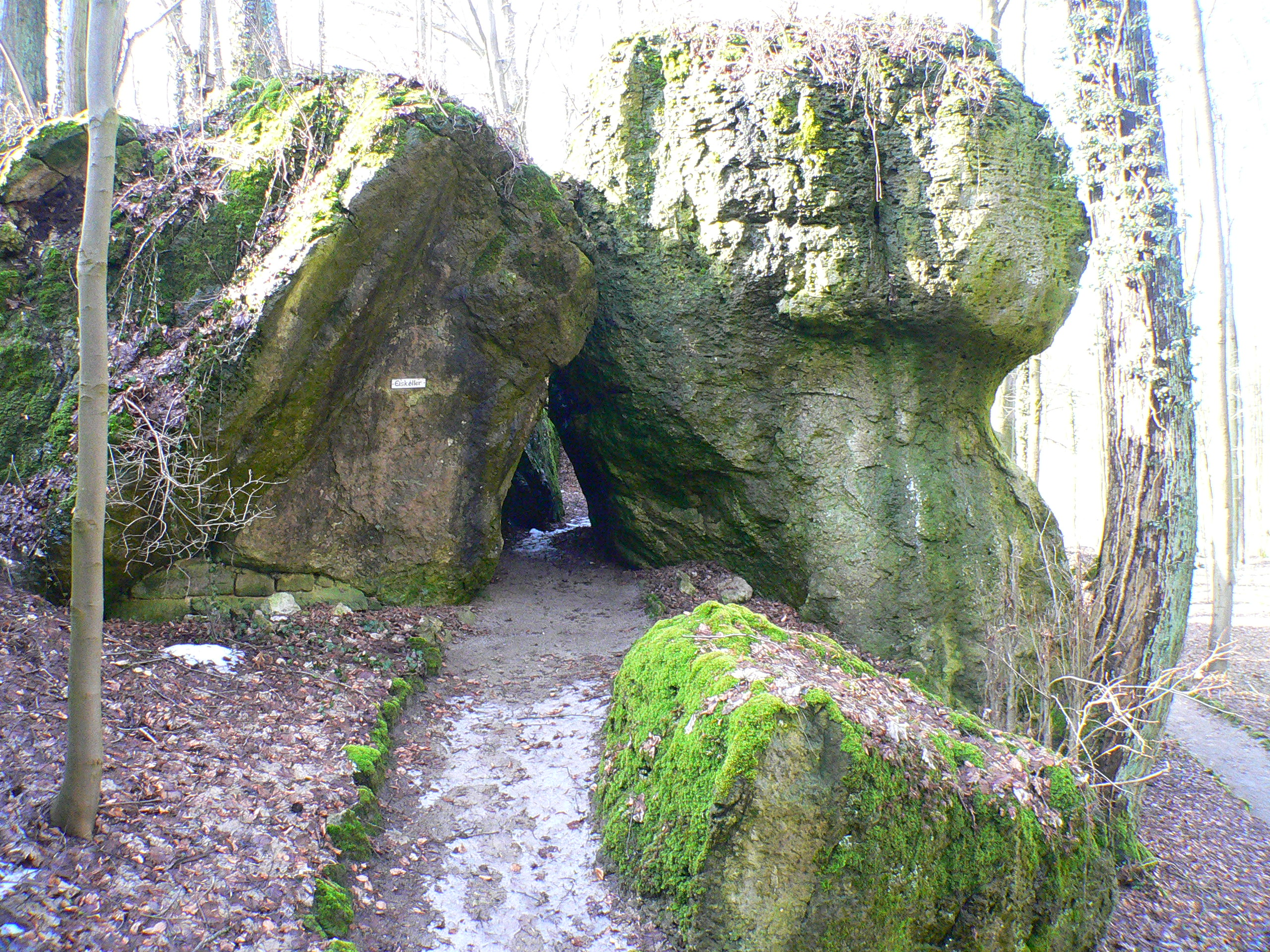 Felsengarten Sanspareil, Eiskeller - Fränkische Schweiz, Bayern